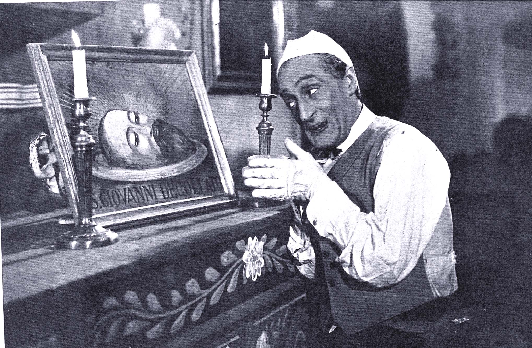 San Giovanni decollato film italiano, regia Amleto Palermi (1886-1941), prod Capitani, Roma, 1940.- foto di scena con Totò